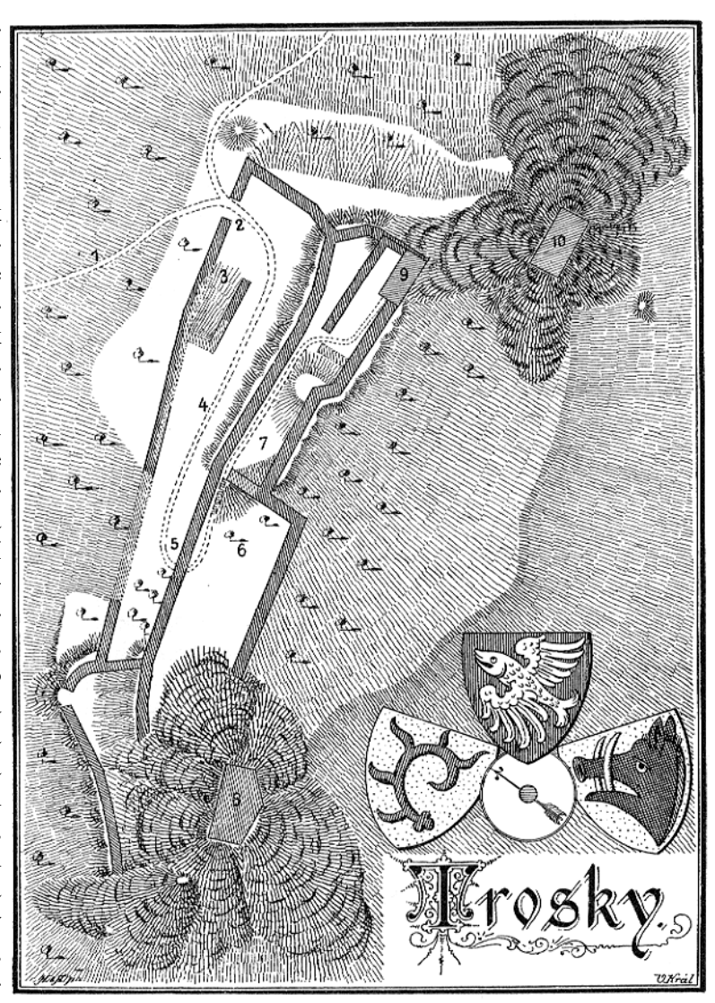 Trosky – půdorys hradu od Vojtěcha Krále z Dobré Vody publikovaný roku 1895; popis: 1 – stará cesta, 2 – první brána, 3 – hospodářská budova, 4 – předhradí, 5 – druhá brána, 6 – dvorek, 7 – palác, 8 – věž Baba, 9 – schodiště na Pannu, 10 – věž Panna. V pravém dolním rohu jsou erby pánů z Bergova, Bibrštejna a ze Šelmberka.